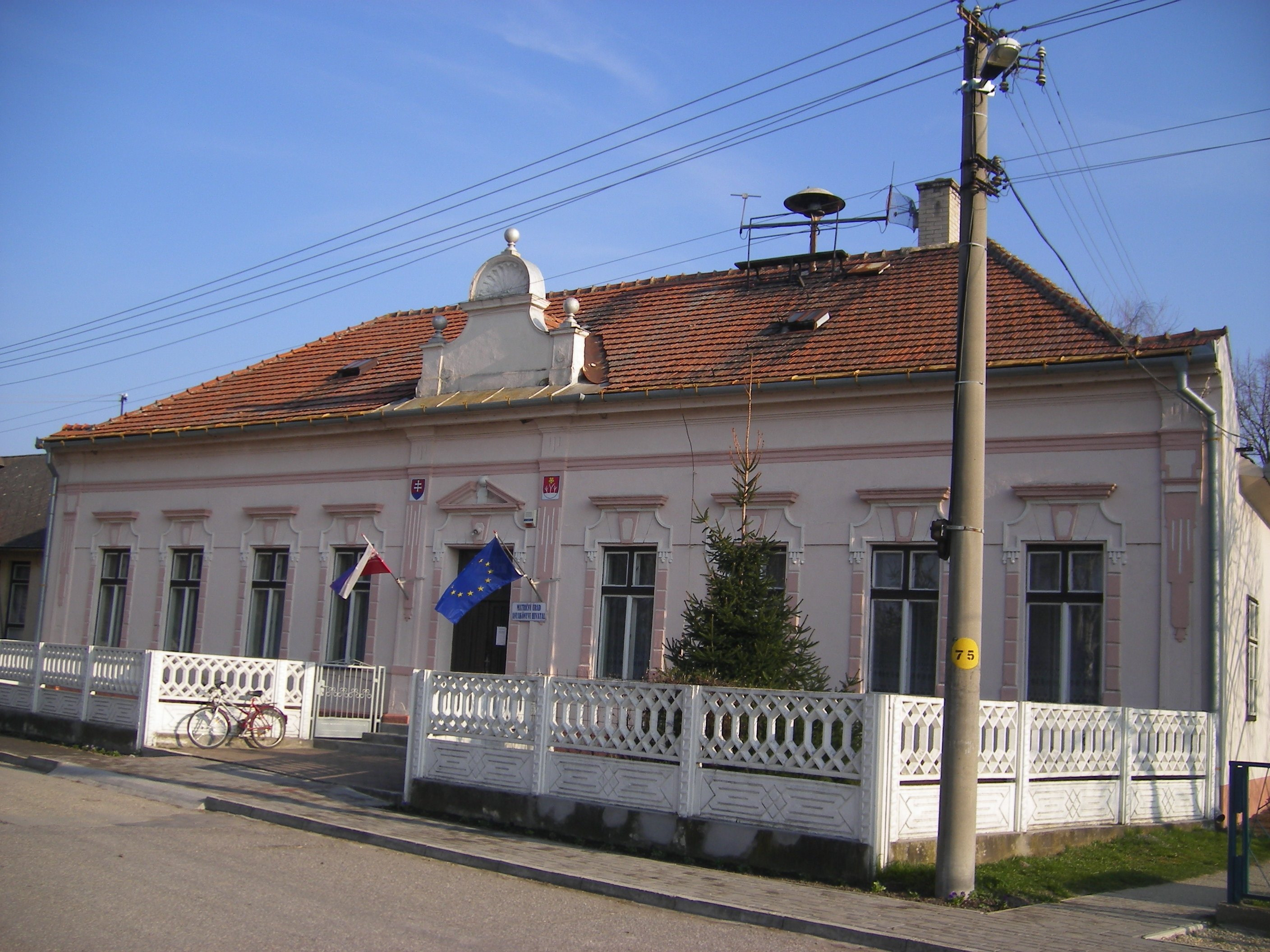 Bogya, a községháza 1913-ban emelt épülete.